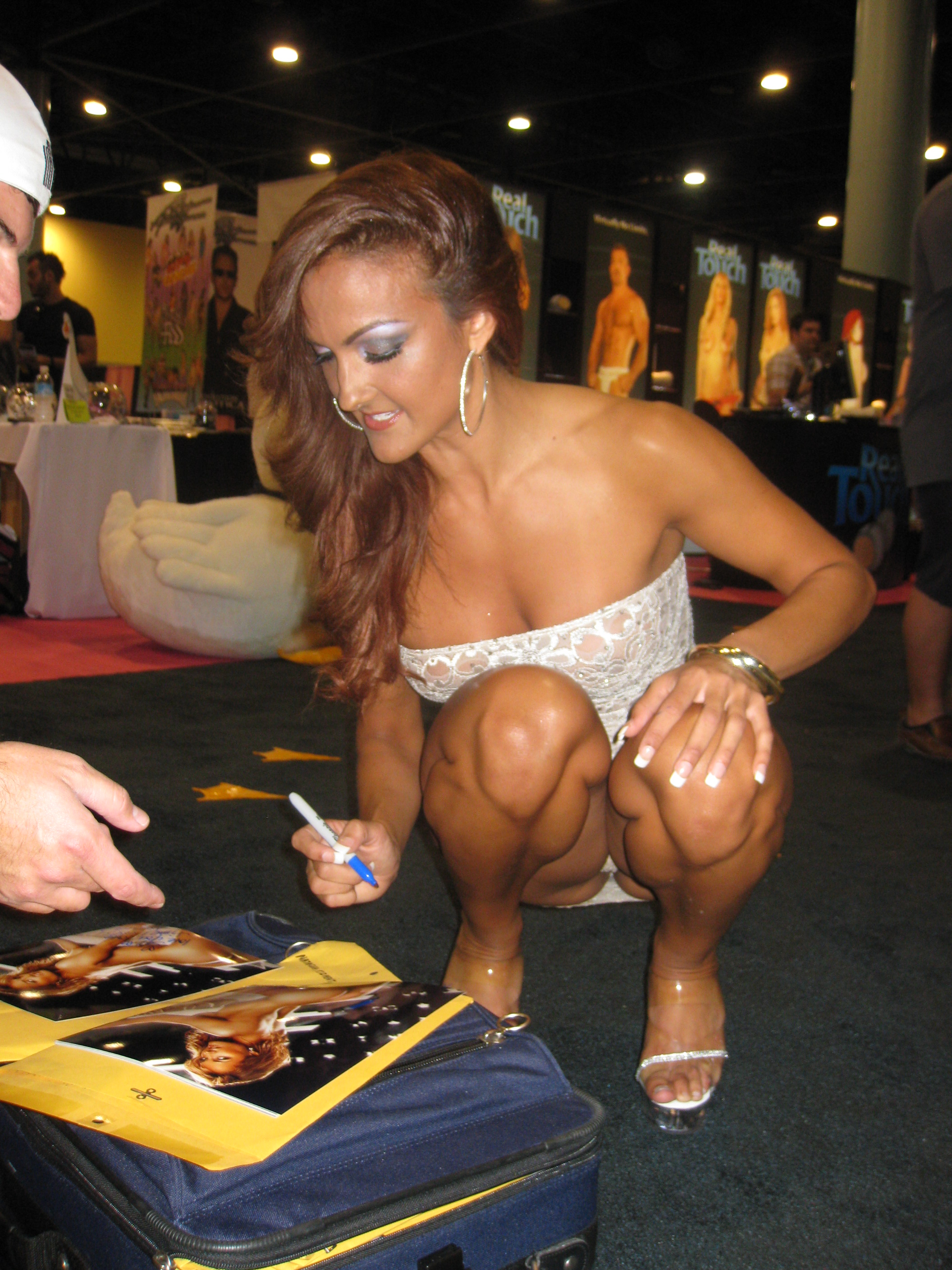 Andrea Sullivan at Exxxotica Miami 2009